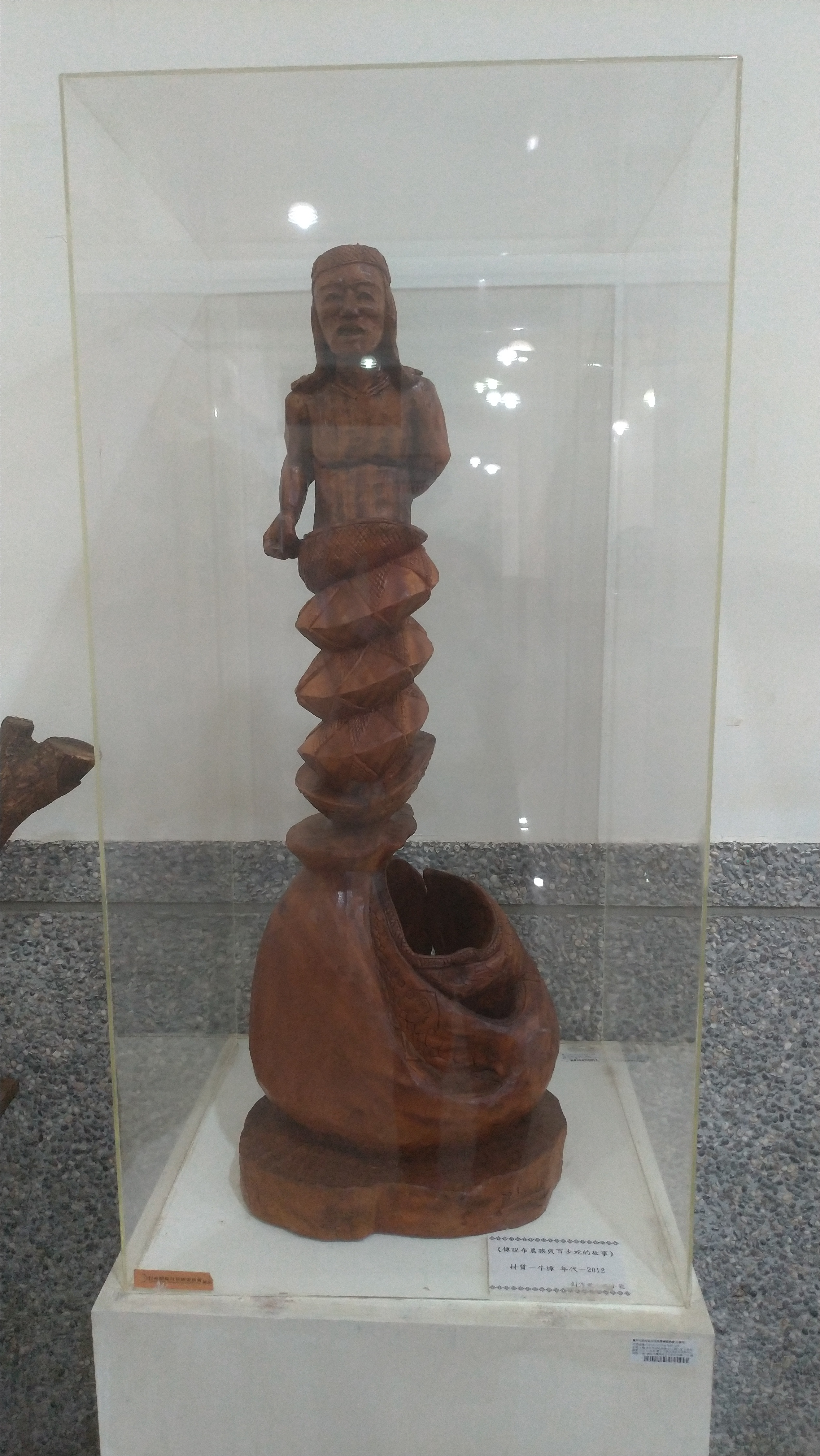 中文（台灣）: 材質-牛樟、年代-2012，傳說布農族與百步蛇的故事